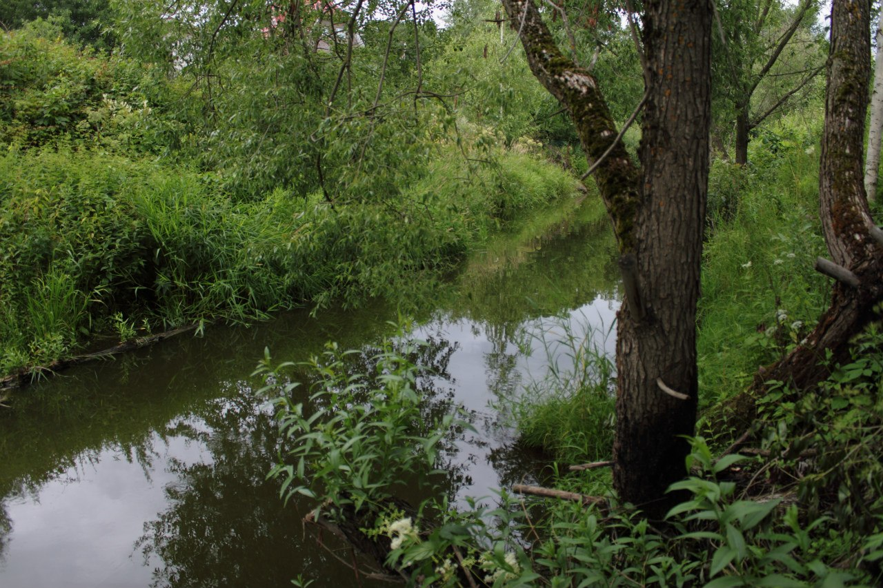 Кузьминка в районе Петро-Славянки при впадении в реку Славянка. Вид с Центральной улицы